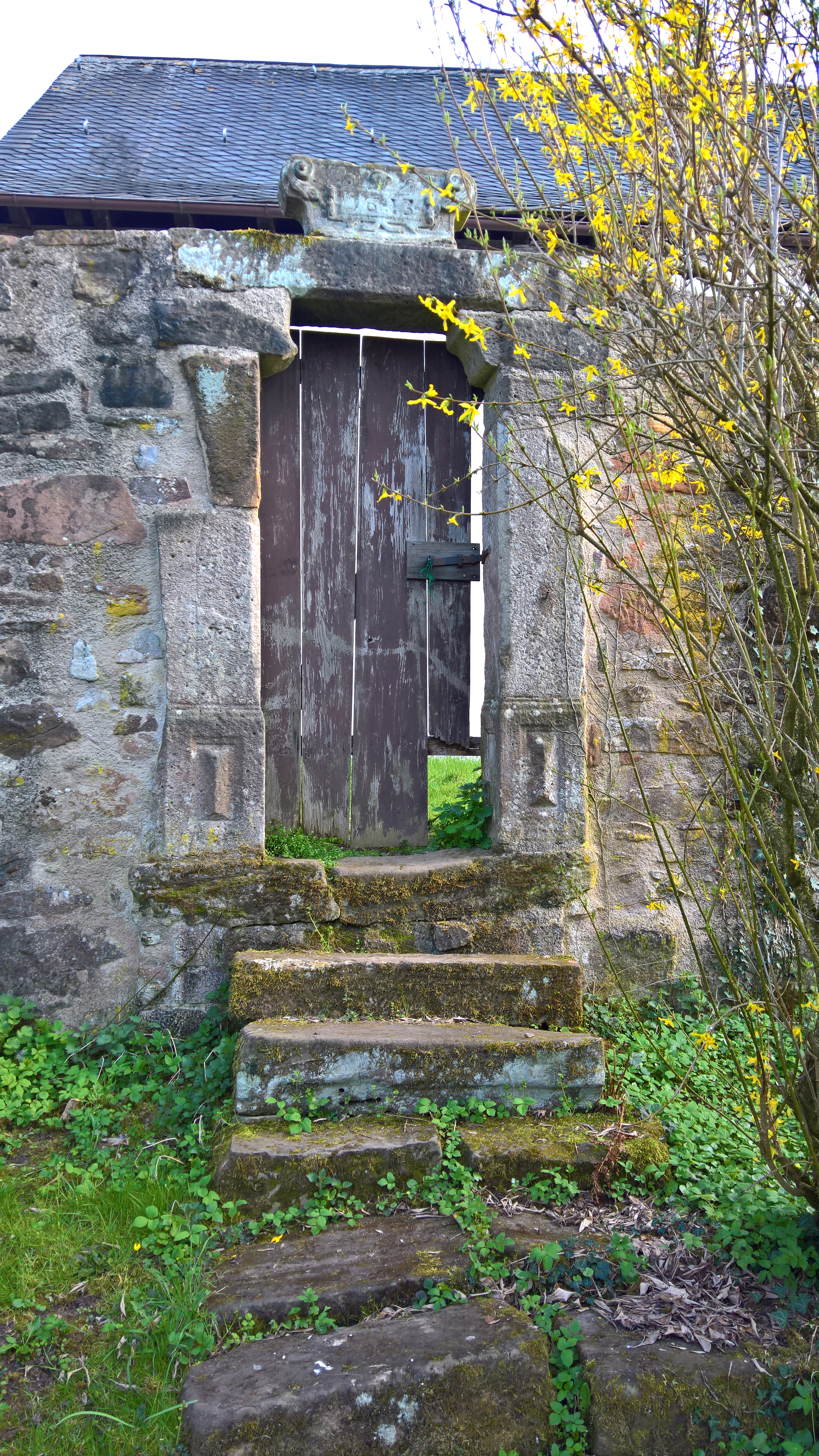 Schlosspforte zur Kirche (mit Jahreszahl 1613)